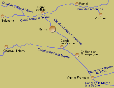 Plan des Kanalsystems in der französischen Region Champagne-Ardenne